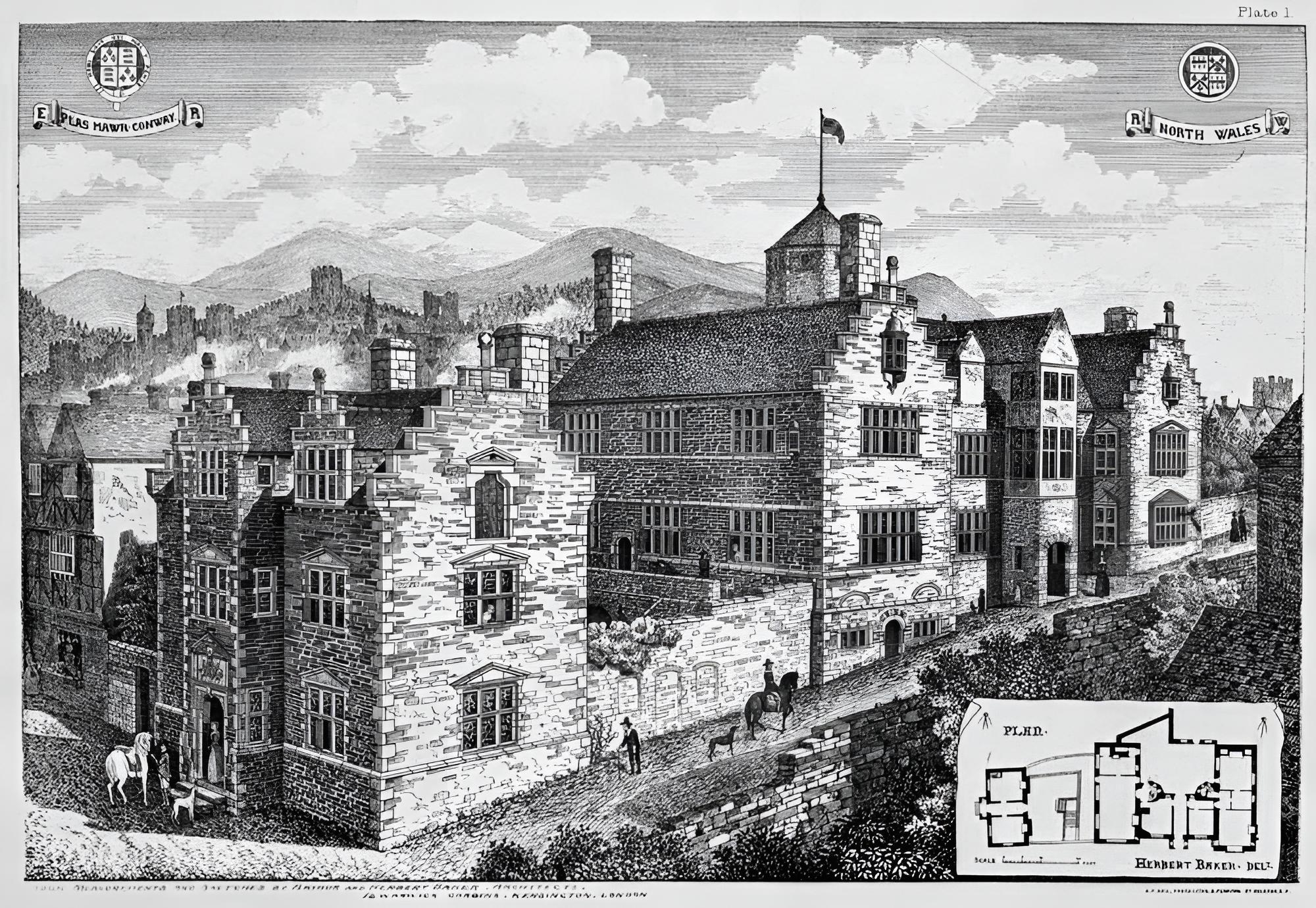 Plas Mawr Conwy Wales